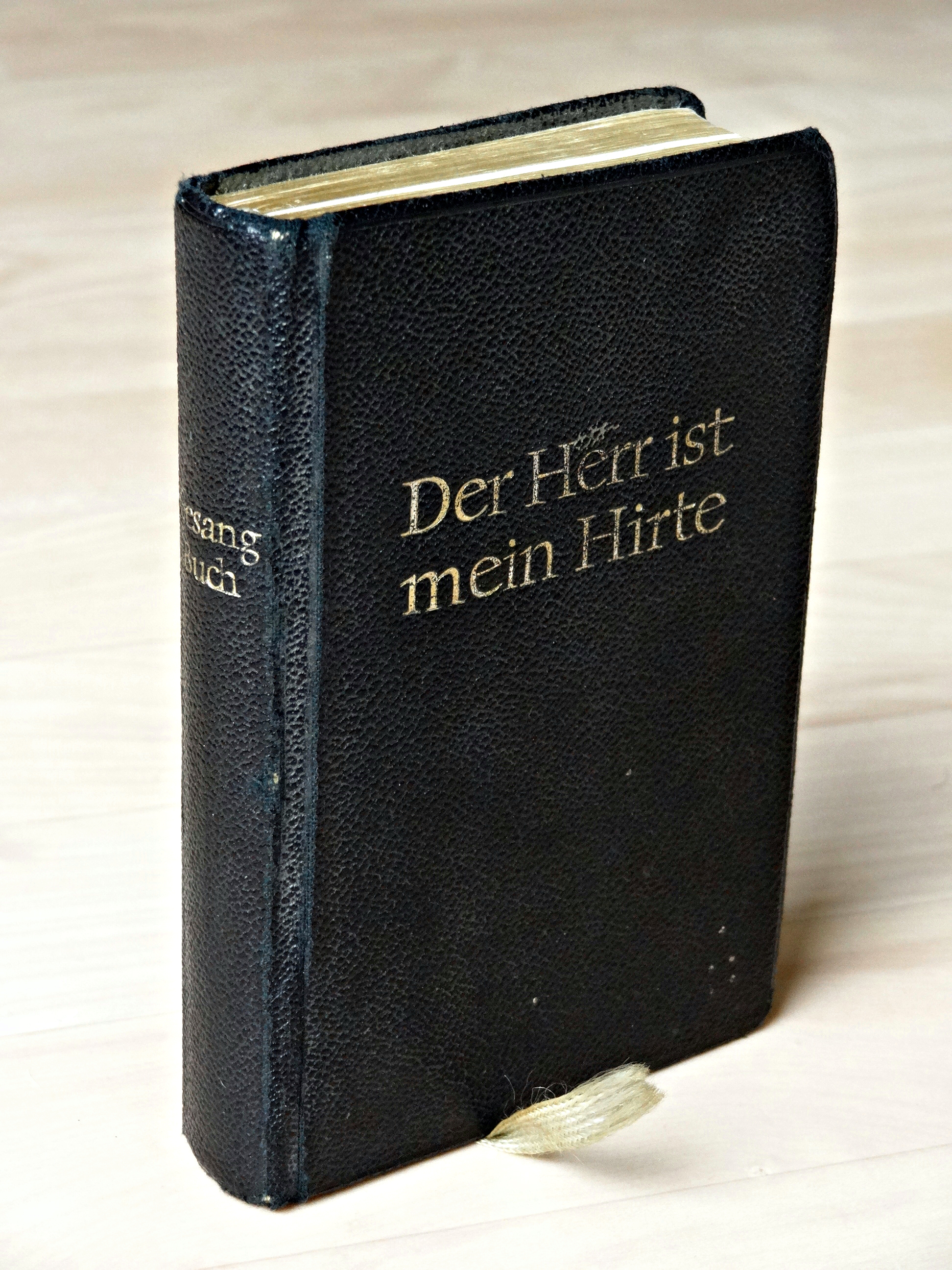 Verlag der Evangelischen Kirche in Hessen und Nassau: Der Herr ist mein Hirte, Gesangbuch, Evangelisches Kirchengesangbuch für die Evangelische Kirche in Hessen und Nassau, 17. Auflage, Herausgegeben auf Beschluß der Ersten Kirchensynode der Evangelischen Kirche in Hessen und Nassau vom 14. April 1950, Darmstadt, 1962